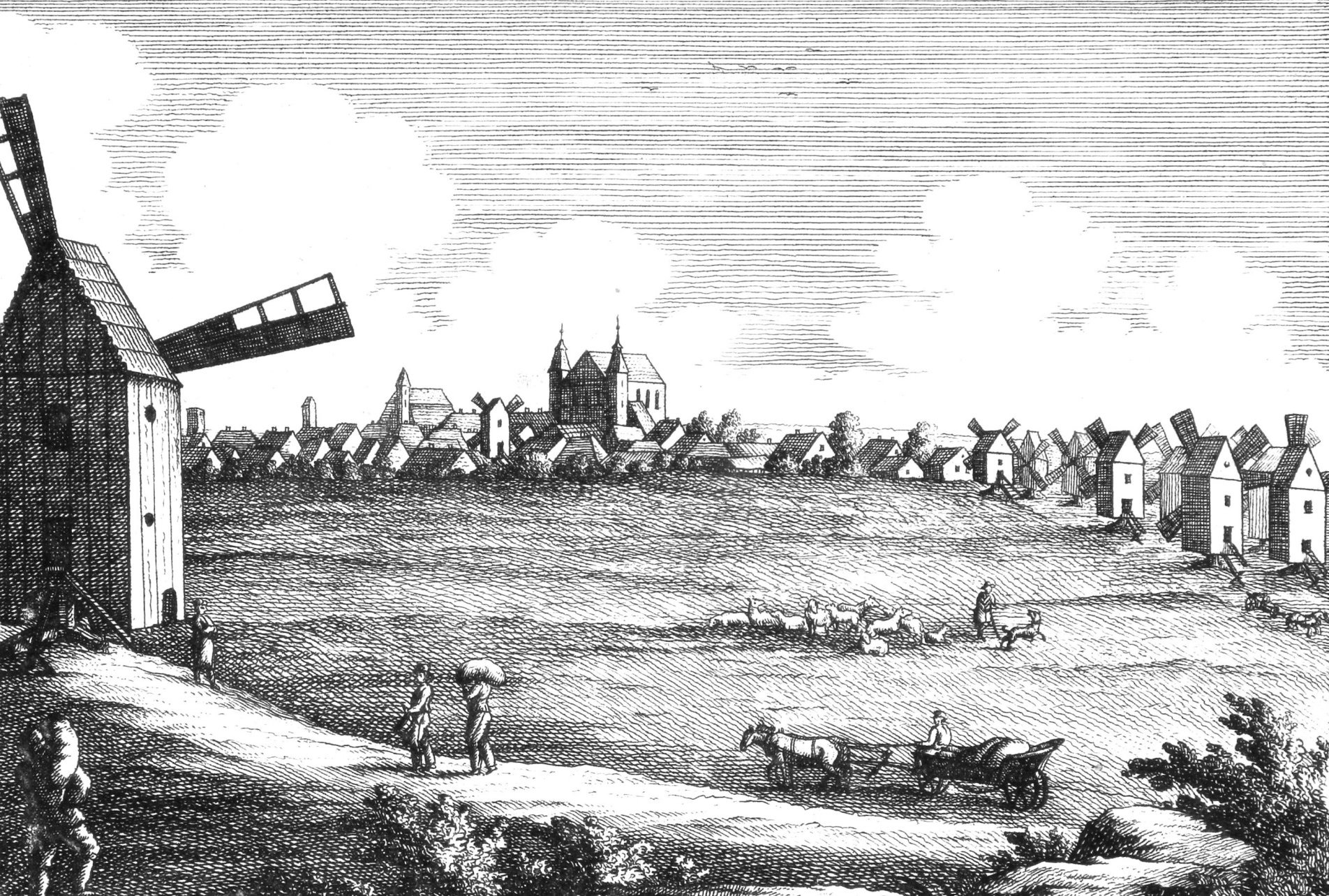 Góra na Dolnym Śląsku